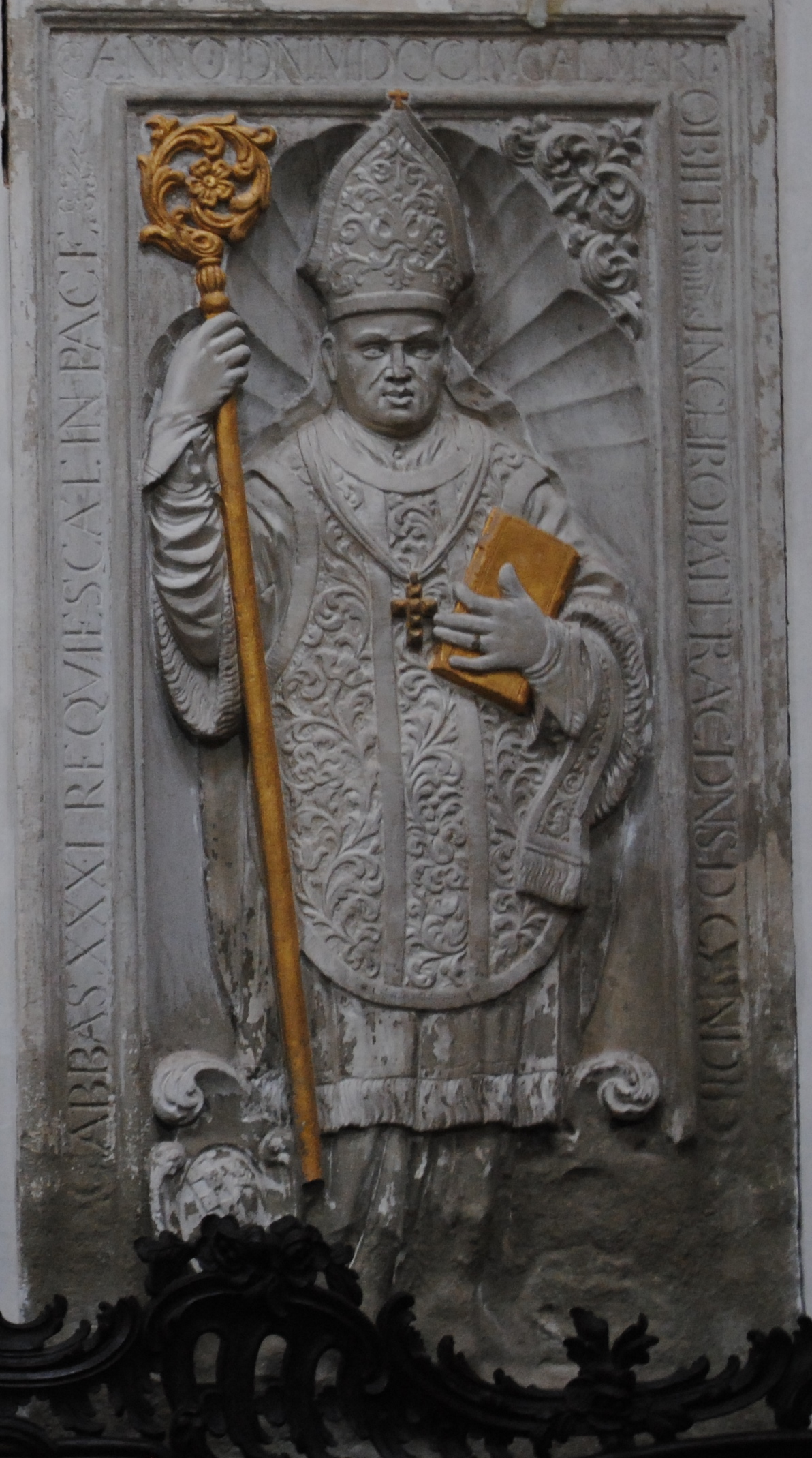 Epitaph des Candidus Pfister, 44. Abt von Kloster Ebrach, Amtszeit 1696-1702